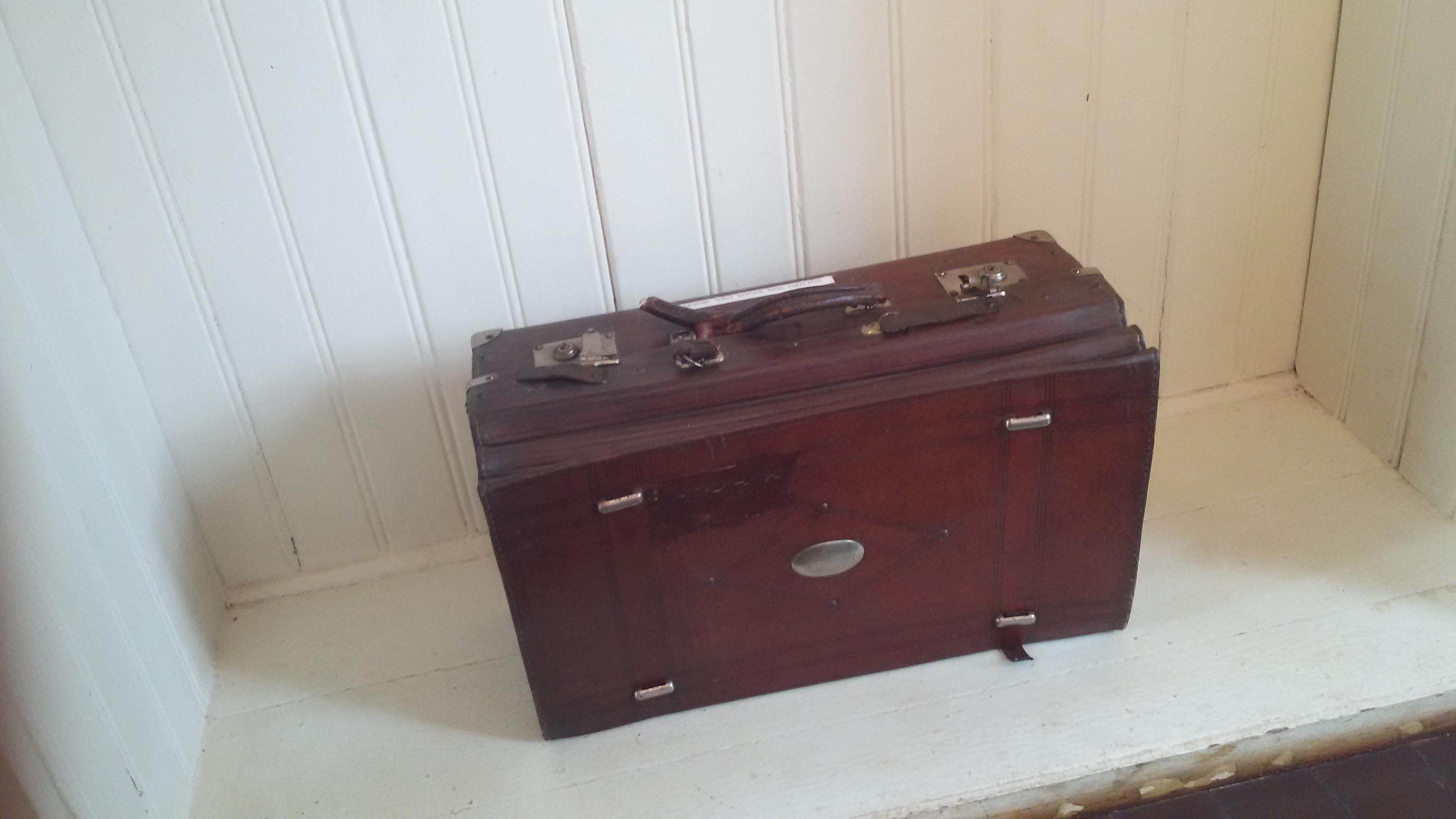 hay muchos objetos originales allá